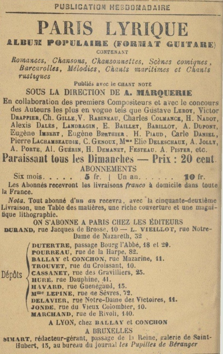 Publicité parue en 4ème de couverture de la brochure Extension des limites de Paris d'après la loi du 16 juin 1859 et le décret du 1er novembre de la même année : tableau indicatif des circonscriptions des nouveaux arrondissements et des délimitations des quartiers, Éditeur : Durand, Paris 1859.